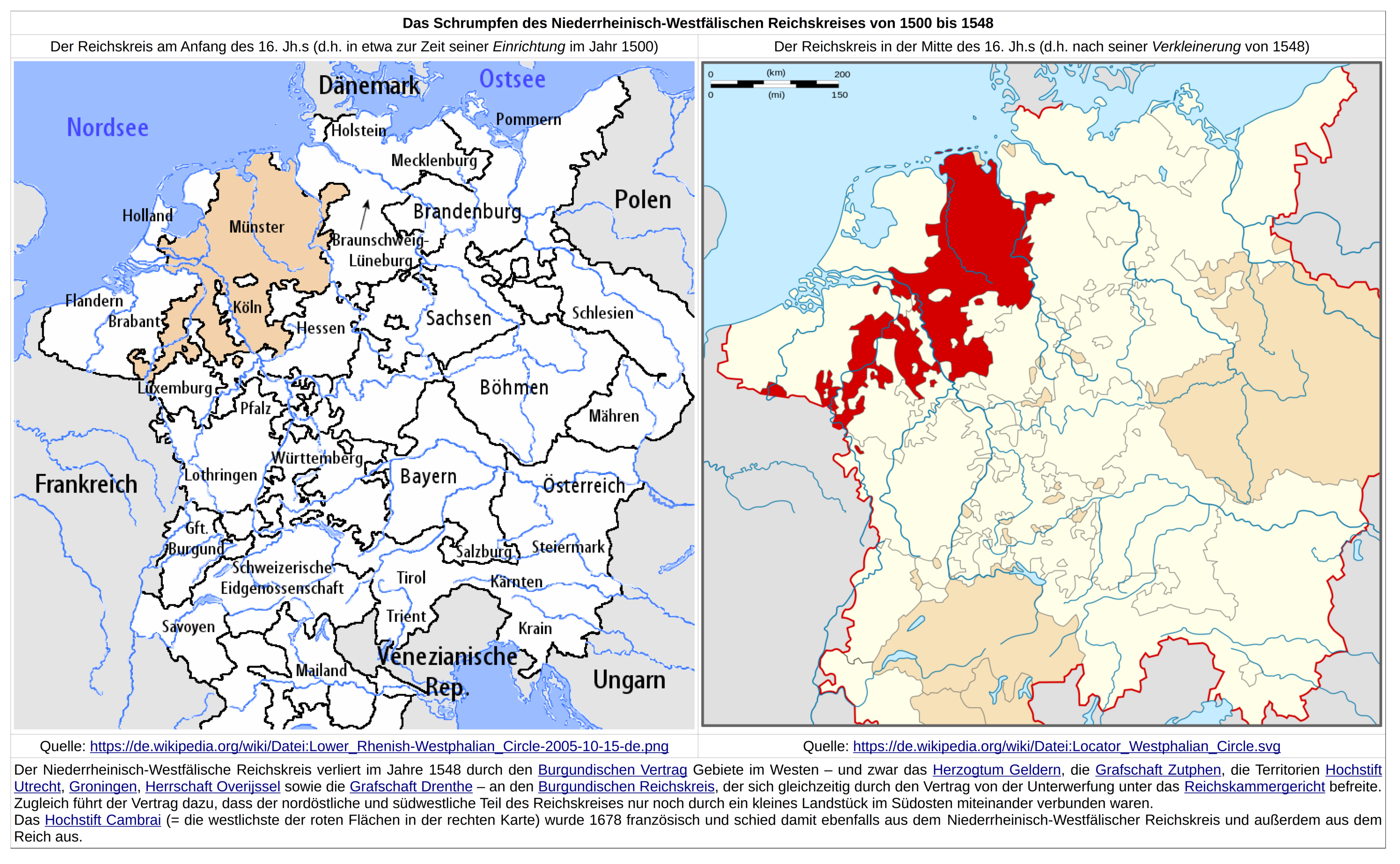 Der Vergleich beider Karten zeigt die - im Westen erfolgte - Verkleinerung des Niederrheinisch-Westfälische Reichskreises durch den Burgundischen Vertrag von 1548, der außerdem am Anfang der Verselbständigung der heutigen Benelux-Staaten steht.